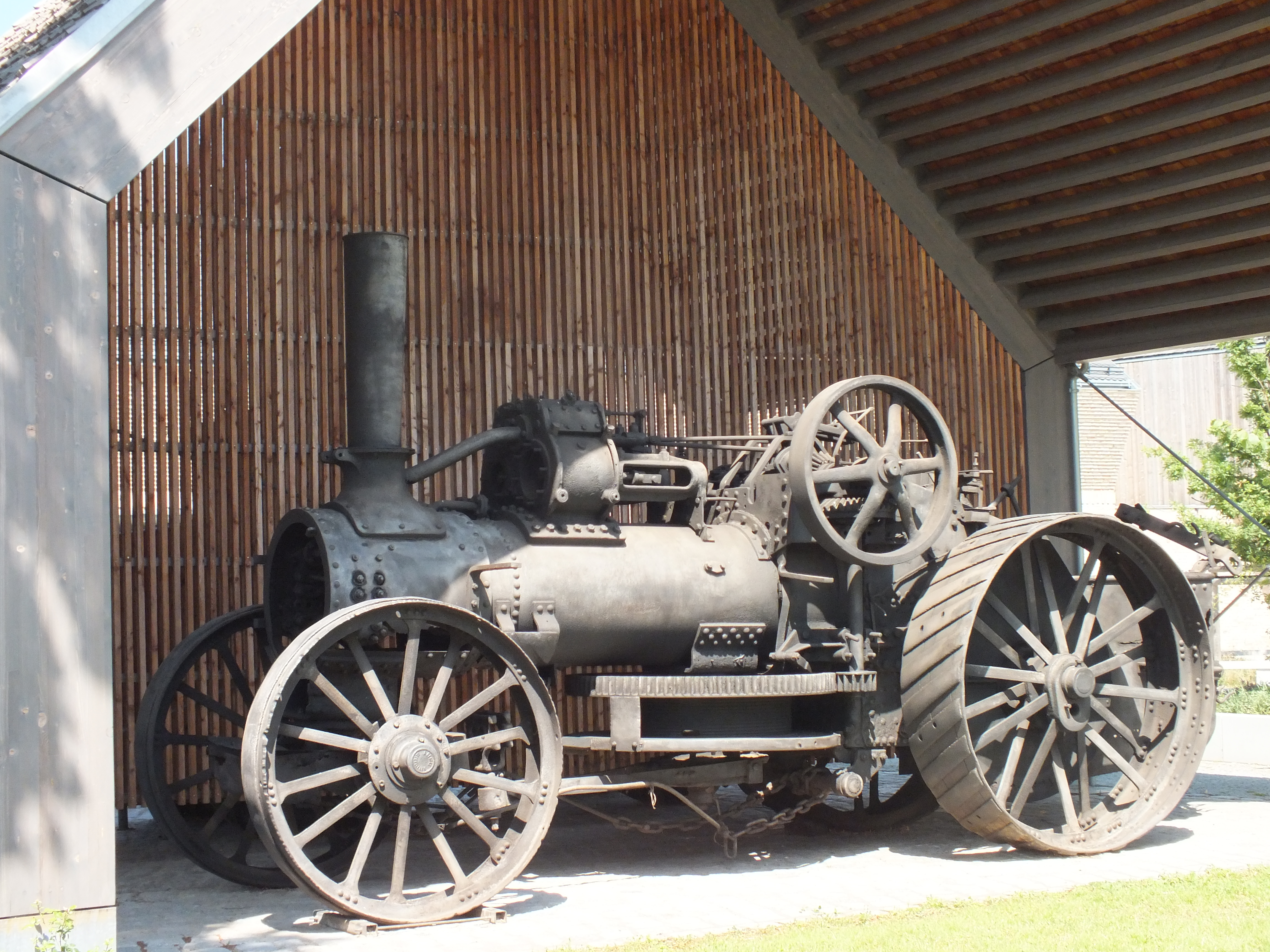 Wandlitz, OT Wandlitz : Exponat Agrarmuseum / Barnim Panorama am neuen Standort